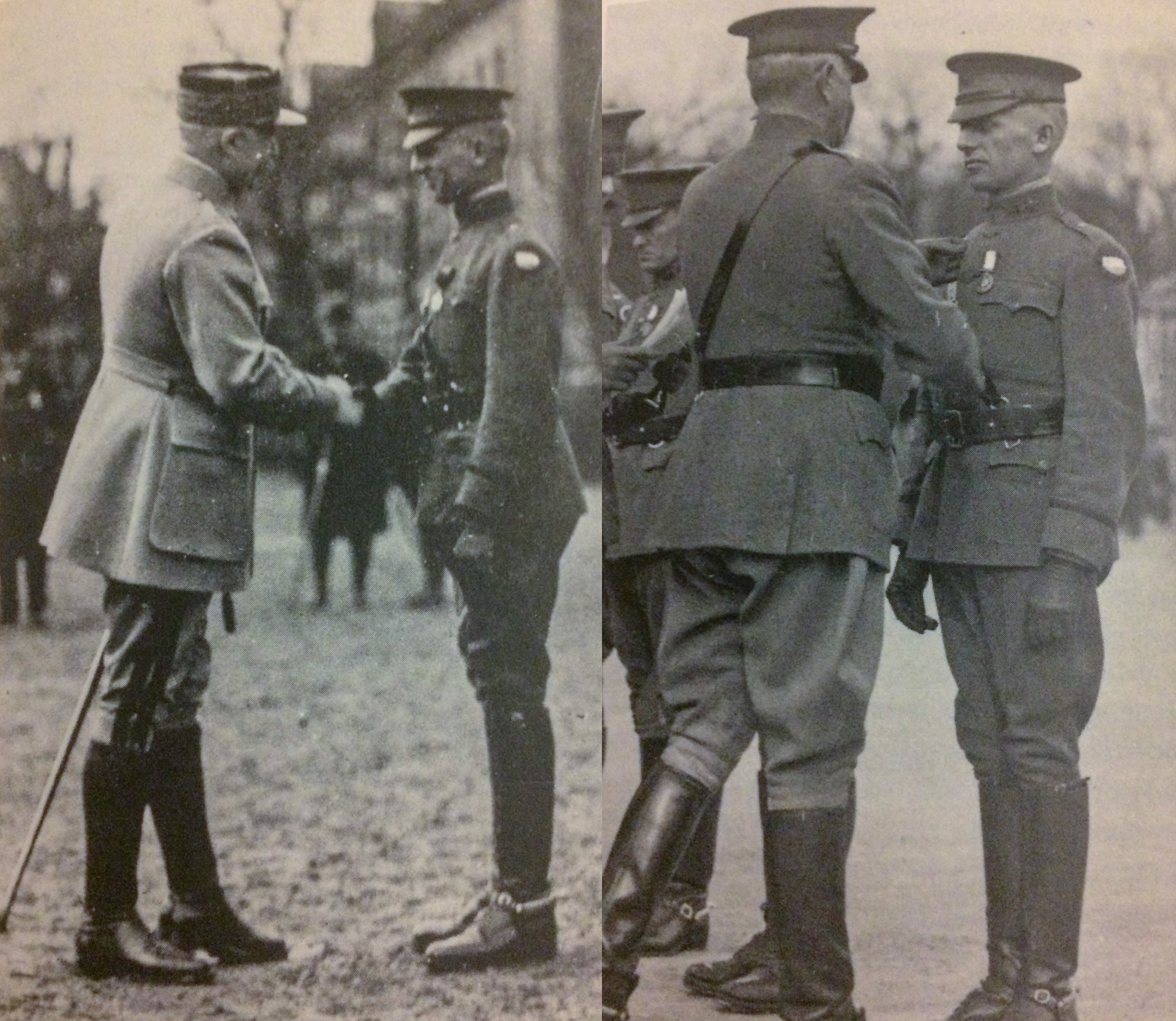 Lesley J. McNair